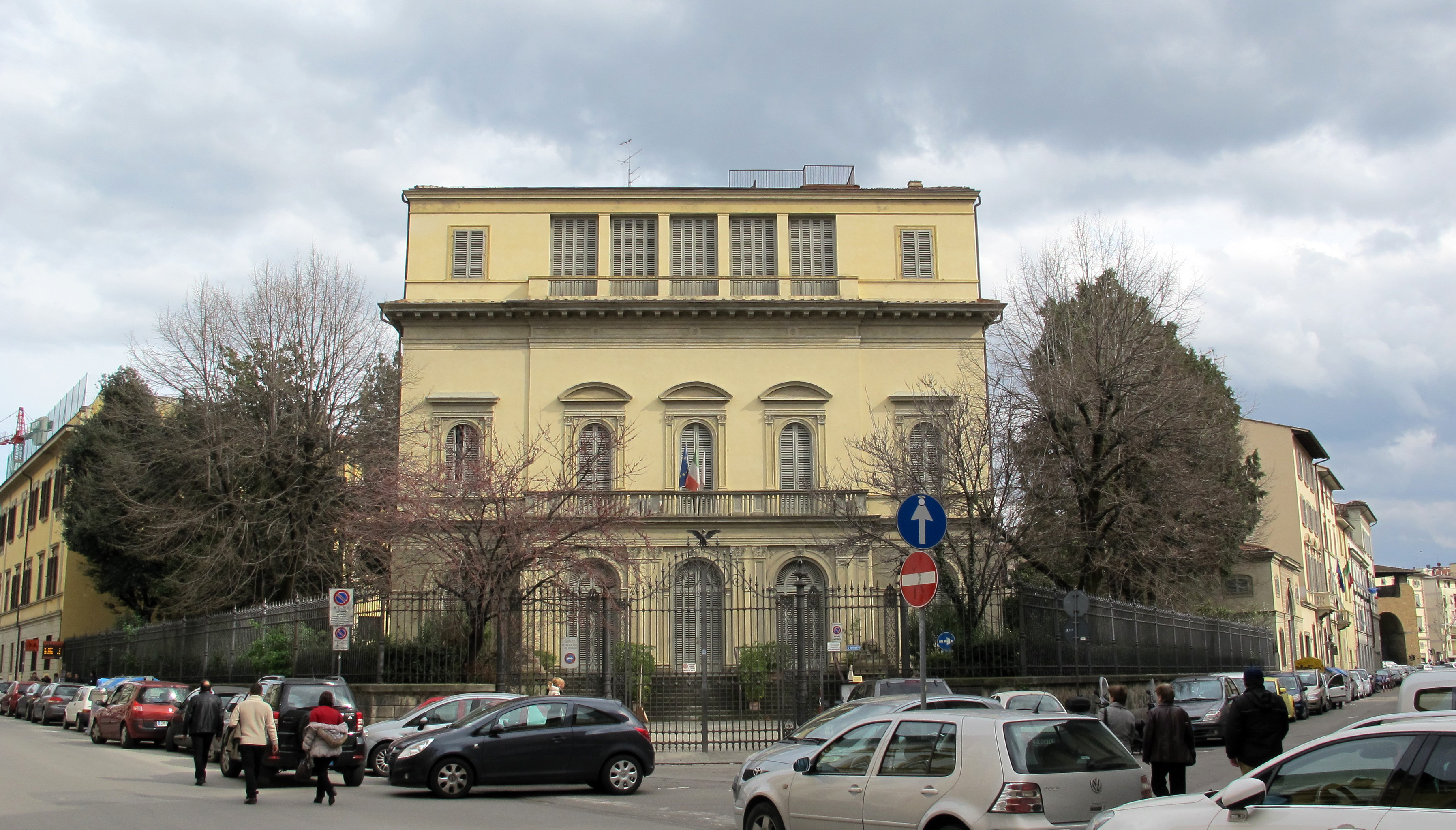 Villa righi